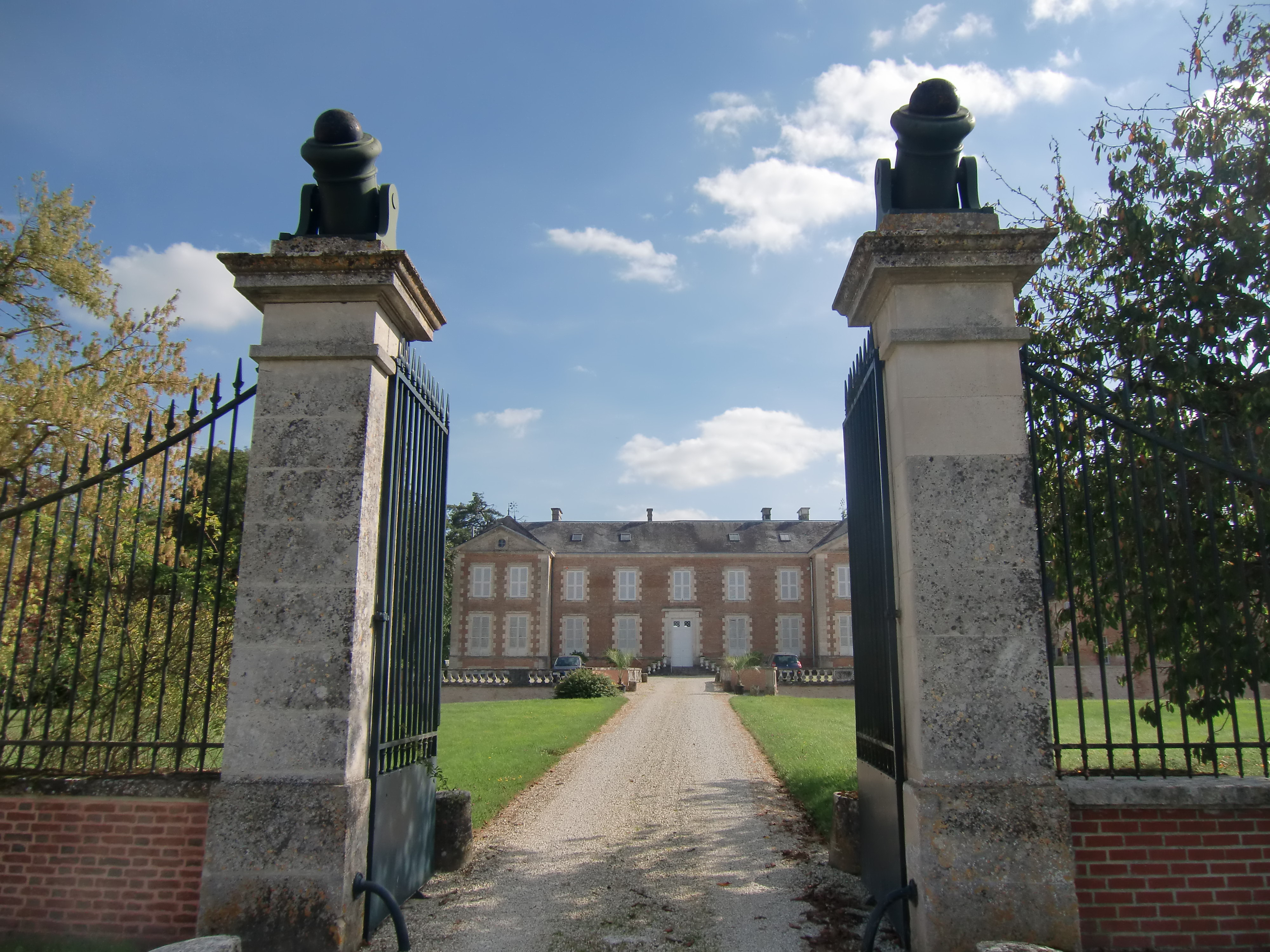 Château du Plessis à Fresnoy-le-Château (Aube - Champagne - France)